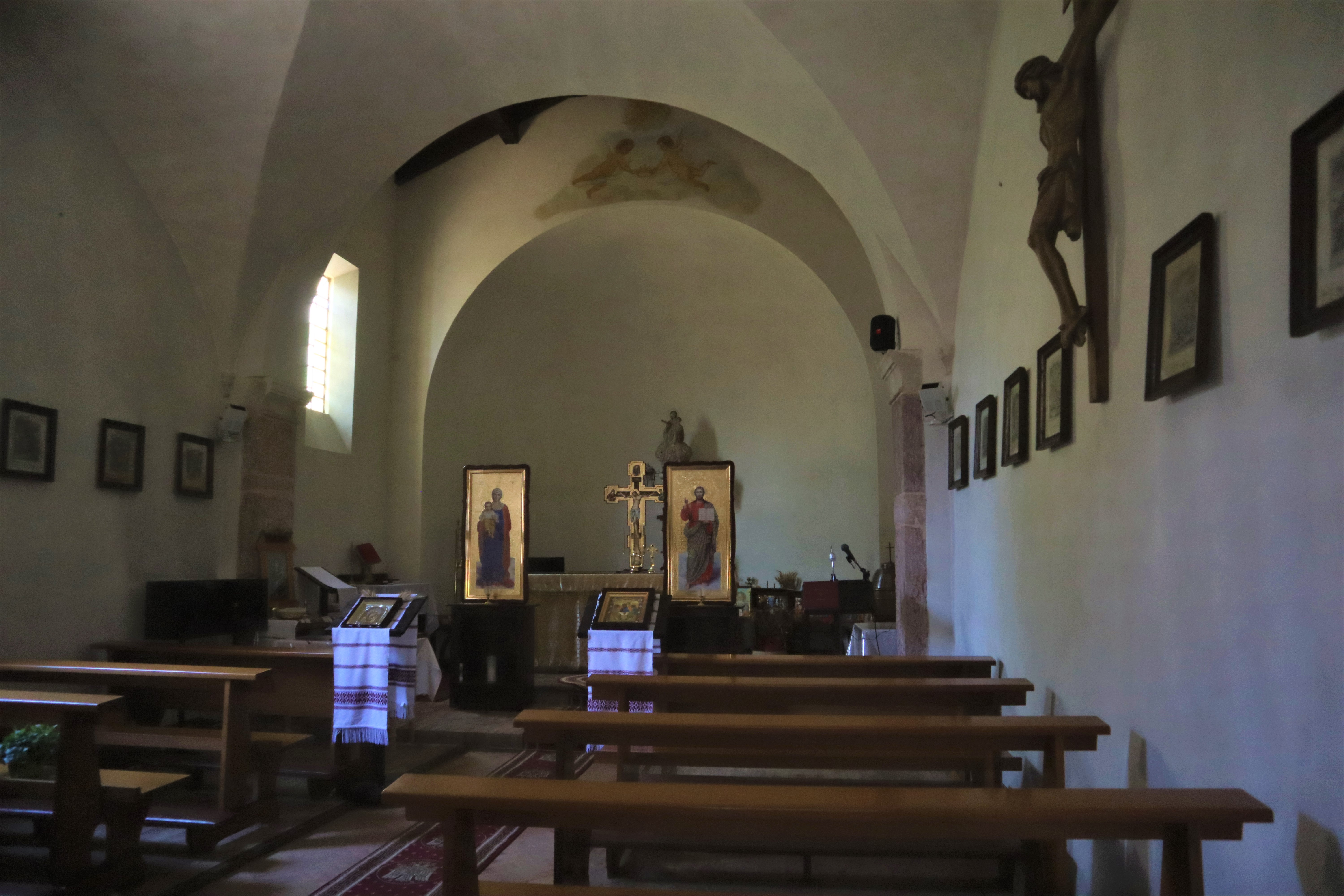 chiesa di Santa Maria delle Vittorie, Linfano di Arco. Interno.